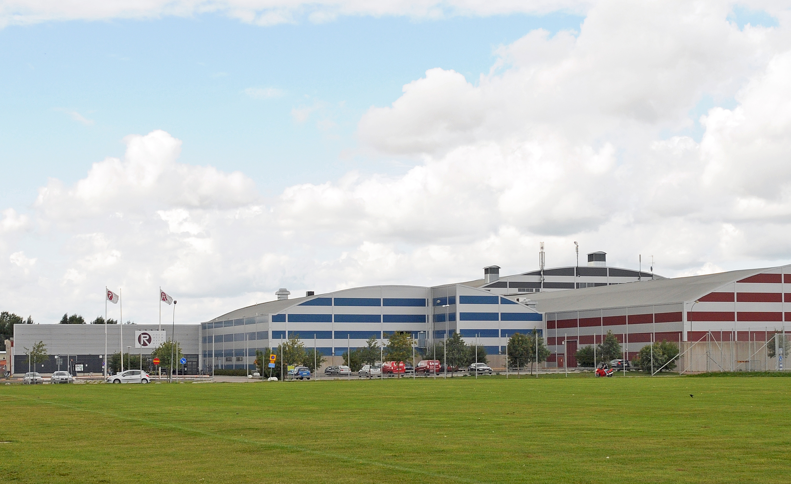 Rosvalla Eventcenter i Nyköping